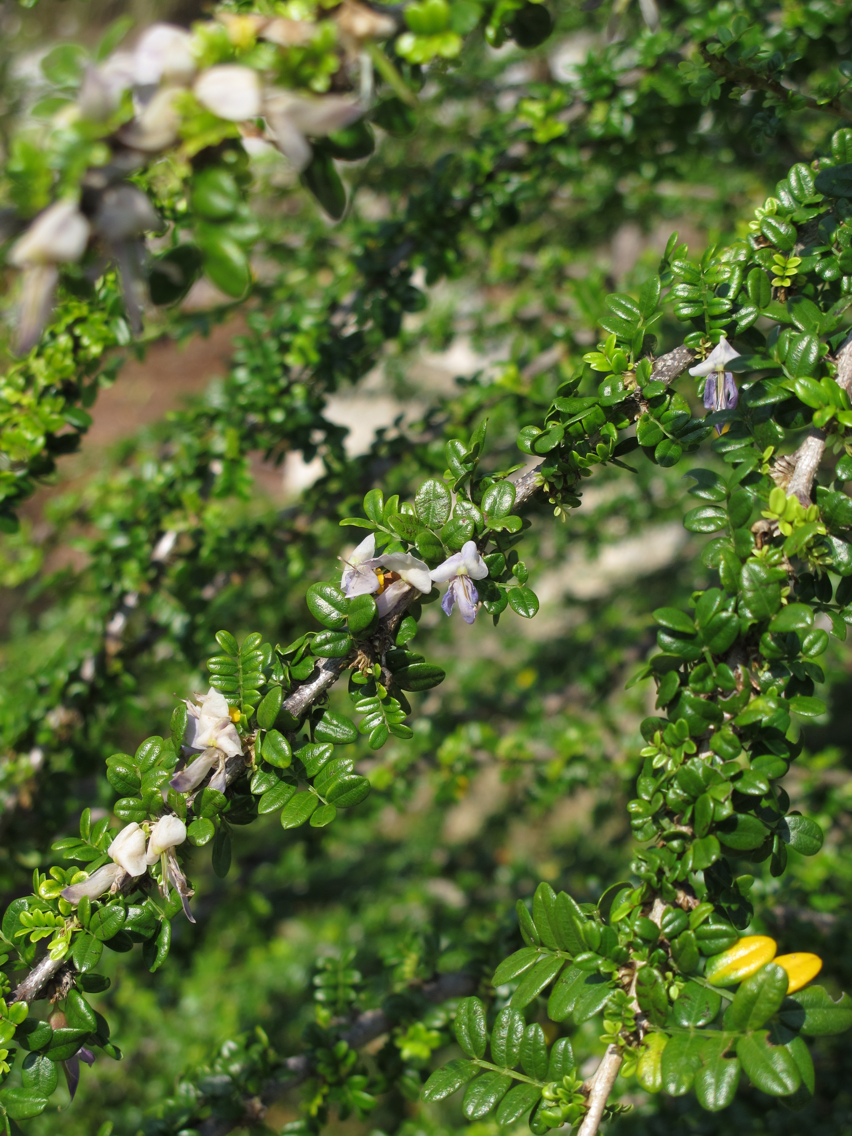 Poitea florida, Naples Botanical Garden, Florida, USA.